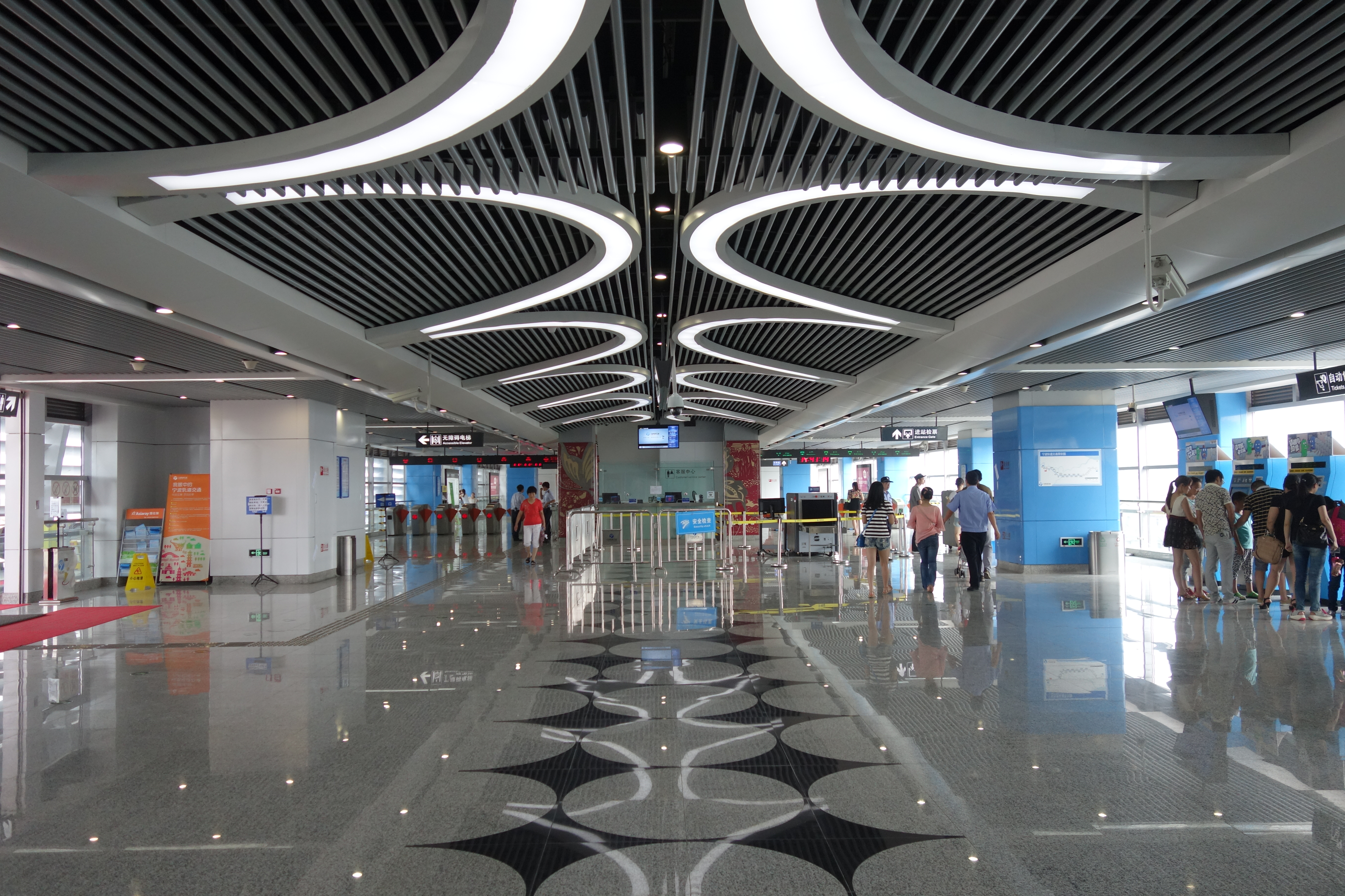 梁祝站站厅